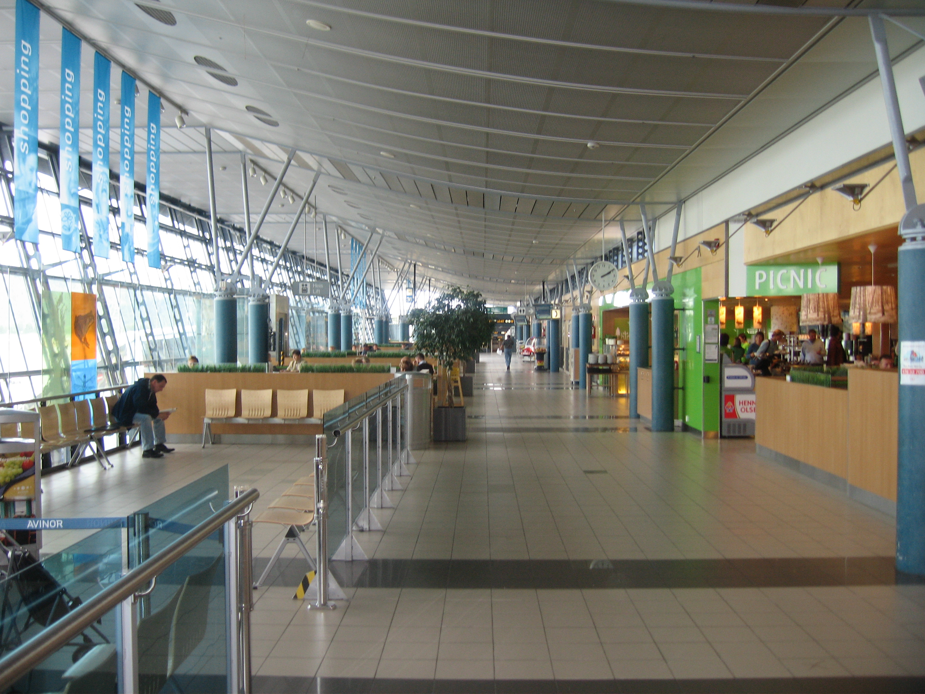 Værnes lufthamn